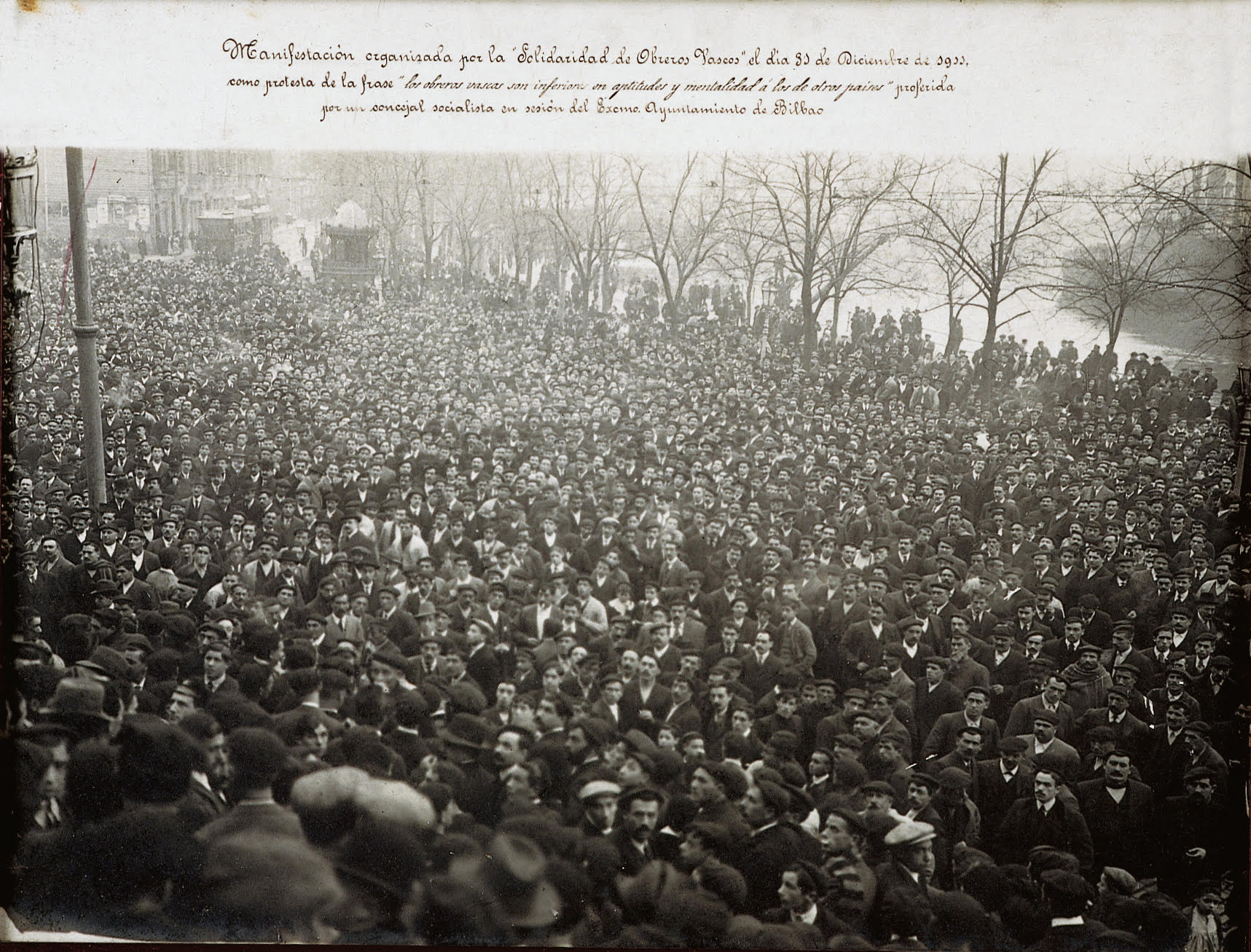 Euskal herritarren kontra Bilboko zinegotzi sozialista batek egindako irainengatik protestatzeko ELA-STVk antolatutako protesta